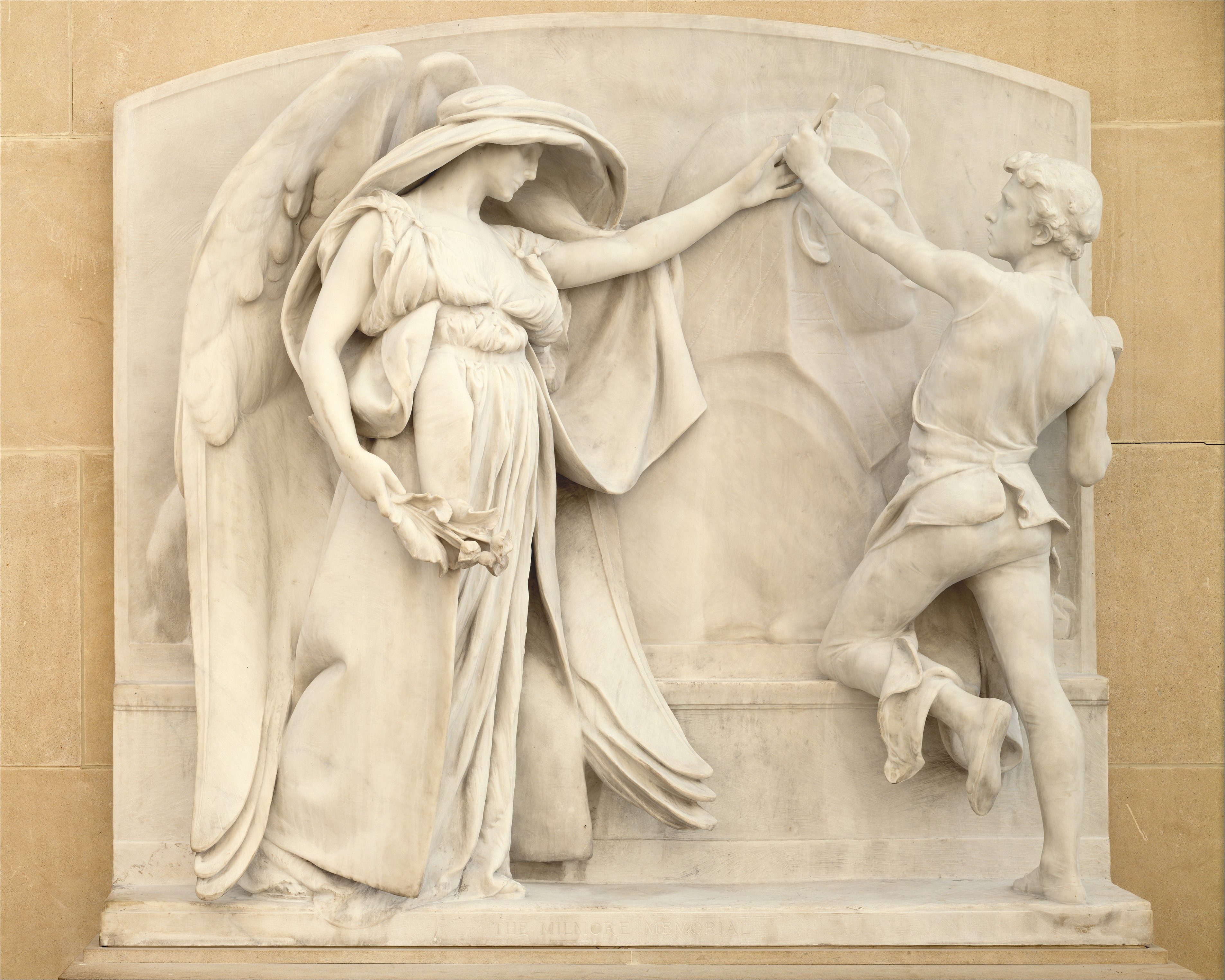 Sculpture; Sculpture